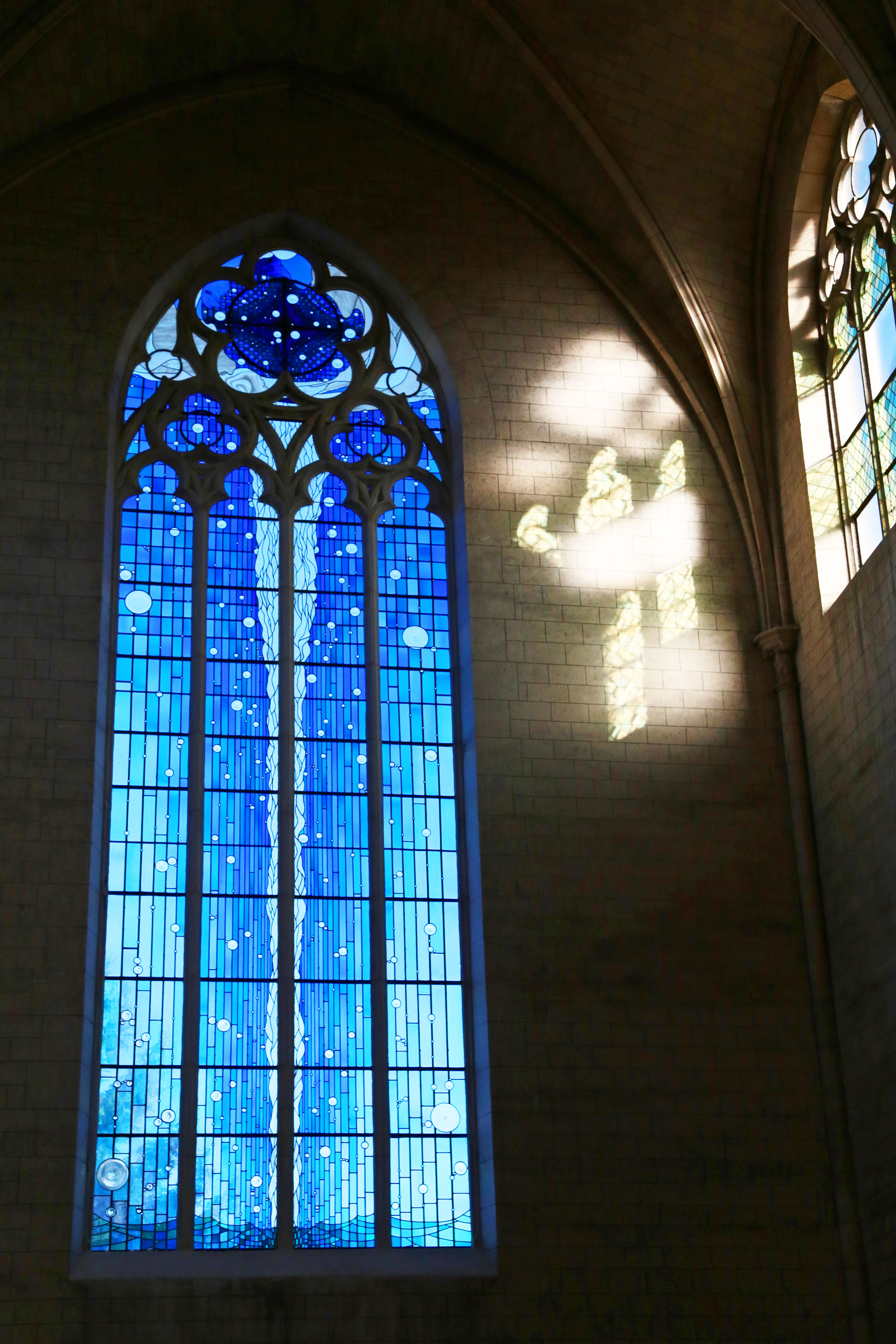 Vitrail de Joël Mône